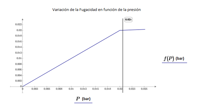 Fugacidad del agua a 18 °C para un intervalo de presiones desde 0 a 2.5 kPa en el software MATHCAD.